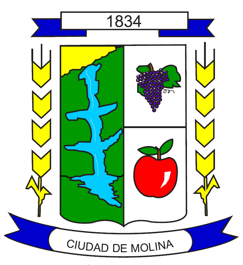 Escudo de Molina